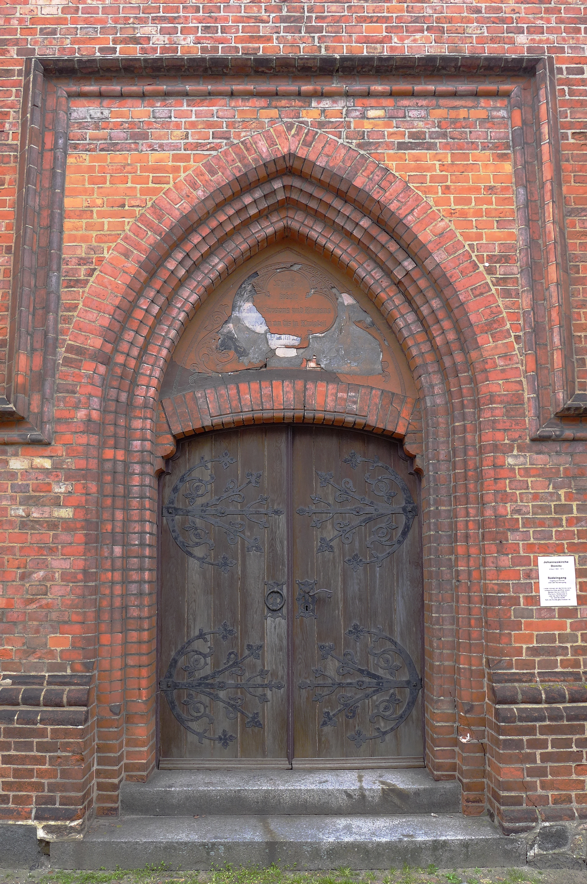 Eingangstür zur Johanneskirche im südwestlichen Teil des Kirchenschiffes. Evang.-Luth. Kirche aus dem Jahre 1872 in Dömitz, Mecklenburg-Vorpommern, Deutschland. Planung und Bauaufsicht für den Kirchenbau: "Bauconductor" Julius Krüger, Schwerin.